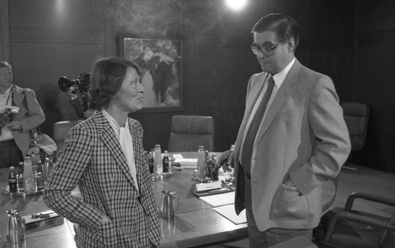 Bundeskanzler Helmut Schmidt empfängt die Ministerpräsidenten der Länder im Bundeskanzleramt.